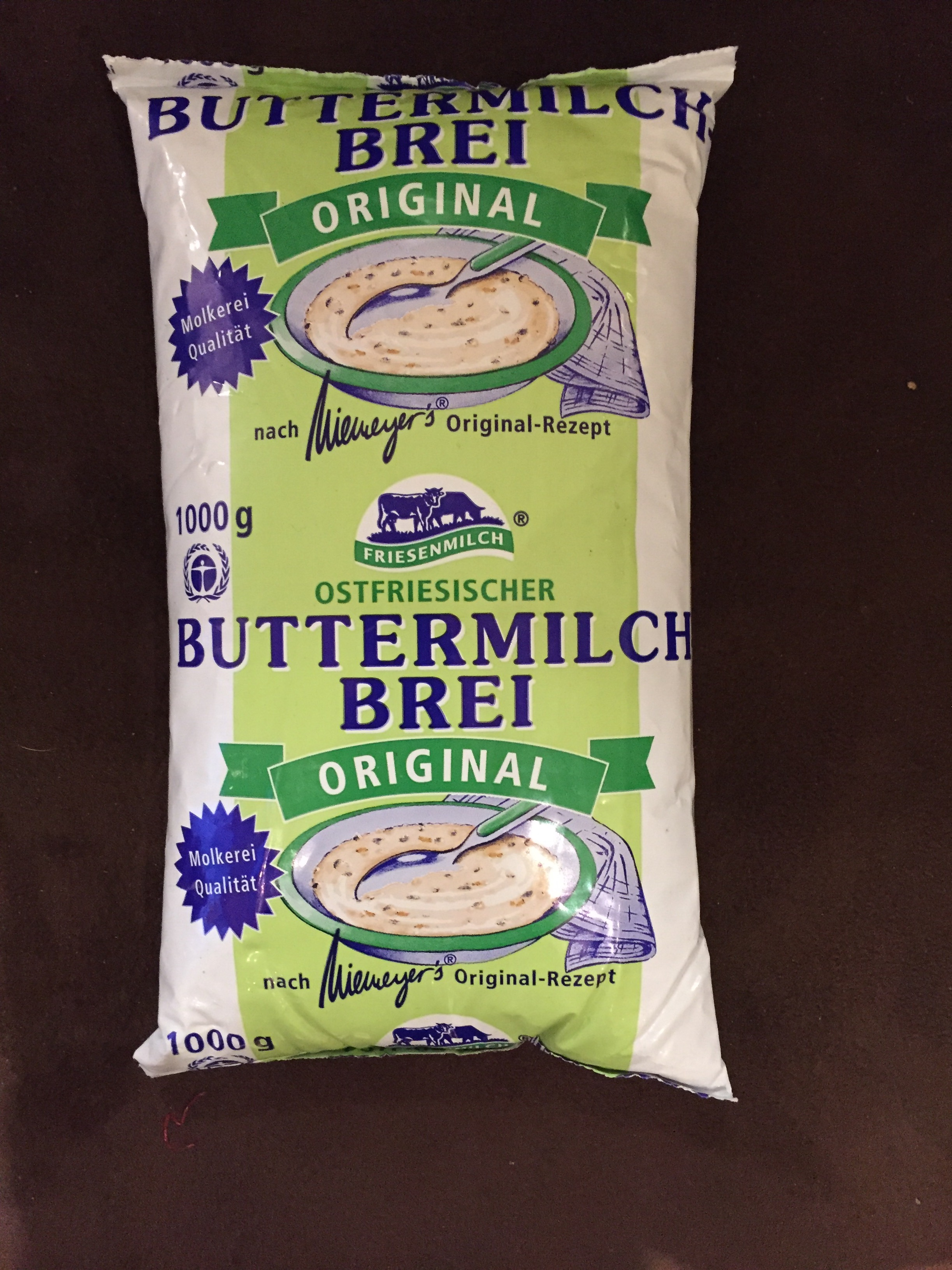 Bottermelkbree Ostfriesischer Buttermilchbrei